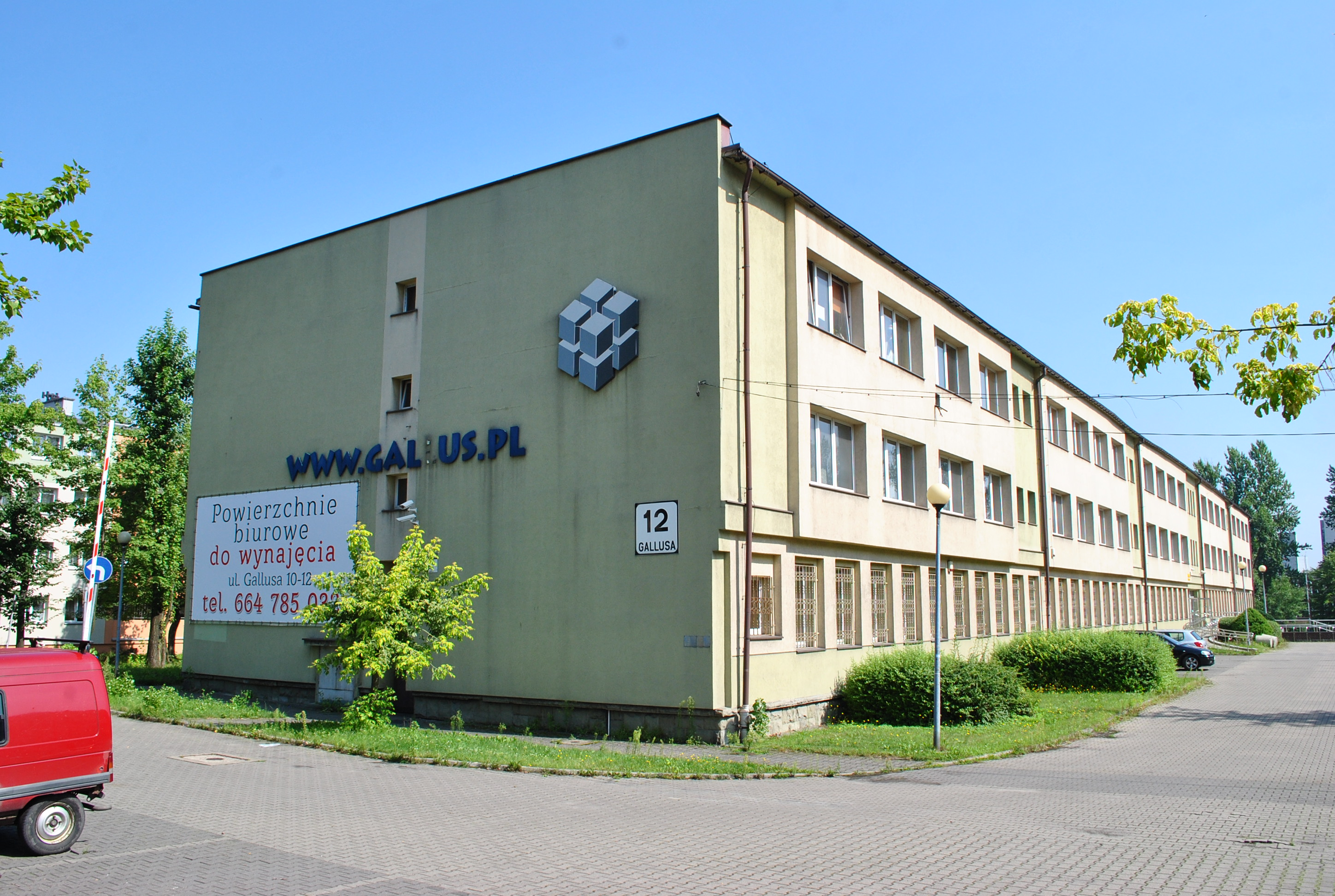 Katowice - Brynów. Siedziba Wyższej Szkoły Zarządzania Marketingowego i Języków Obcych w Katowicach